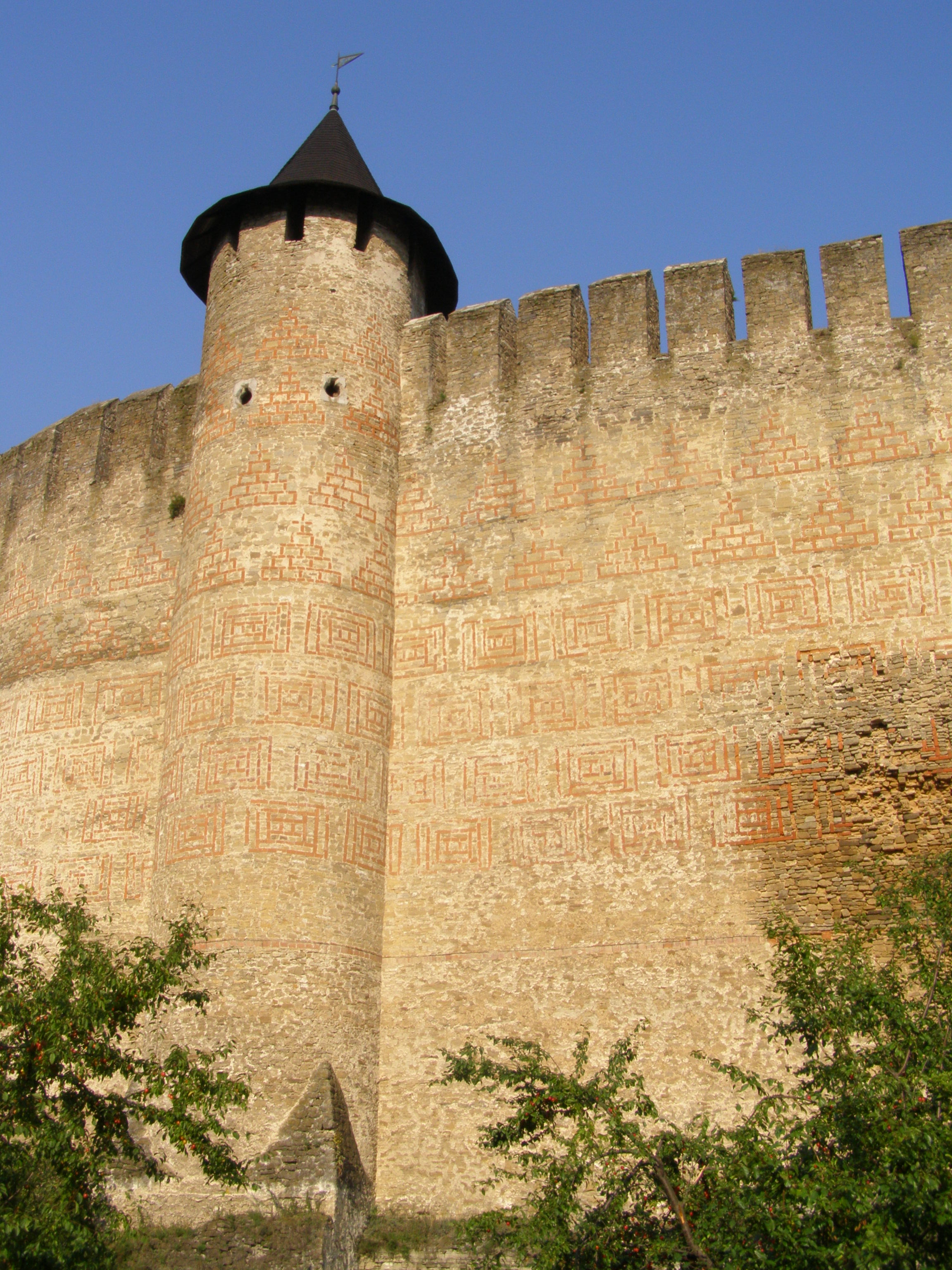 Chotyn, věž na východní straně pevnost